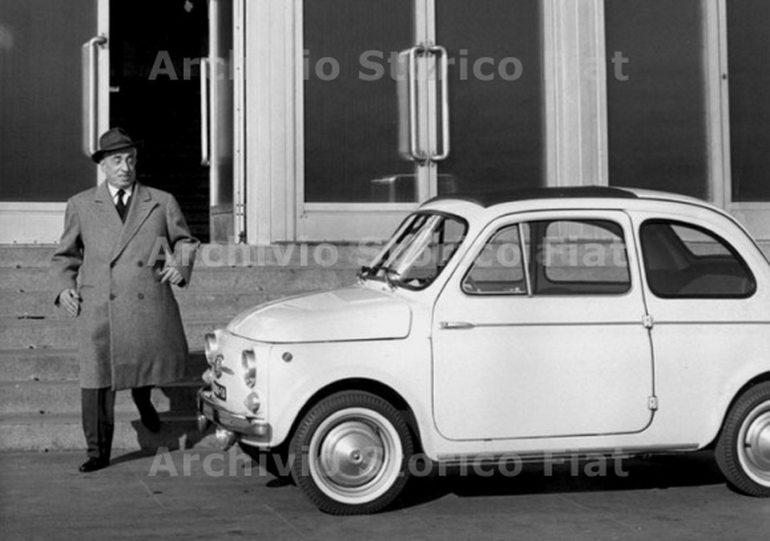 Fotografia a figura intera di Vittorio Valletta accanto alla Fiat 500 D (Fiat Group Marketing & Corporate Communication spa, Archivio e centro storico Fiat, Archivio iconografico, Personaggi Fiat, Vittorio Valletta)